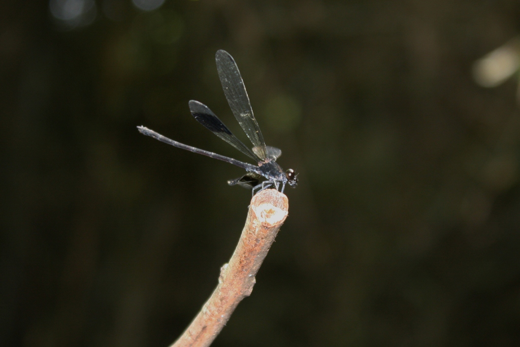 Taken near Ho Chung, Sai Kung.